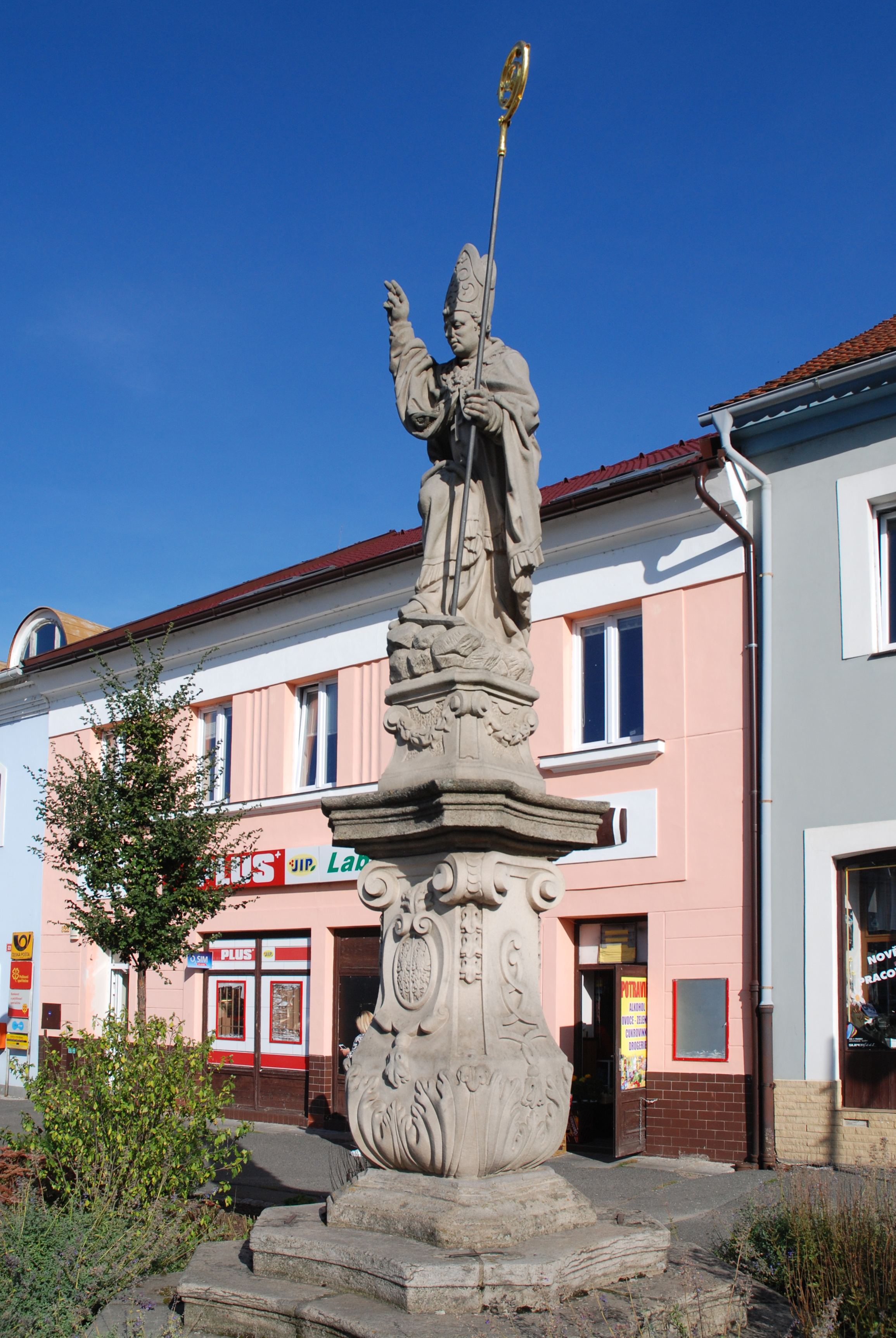 Socha sv. Kiliána na Masarykově náměstí v Přešticích